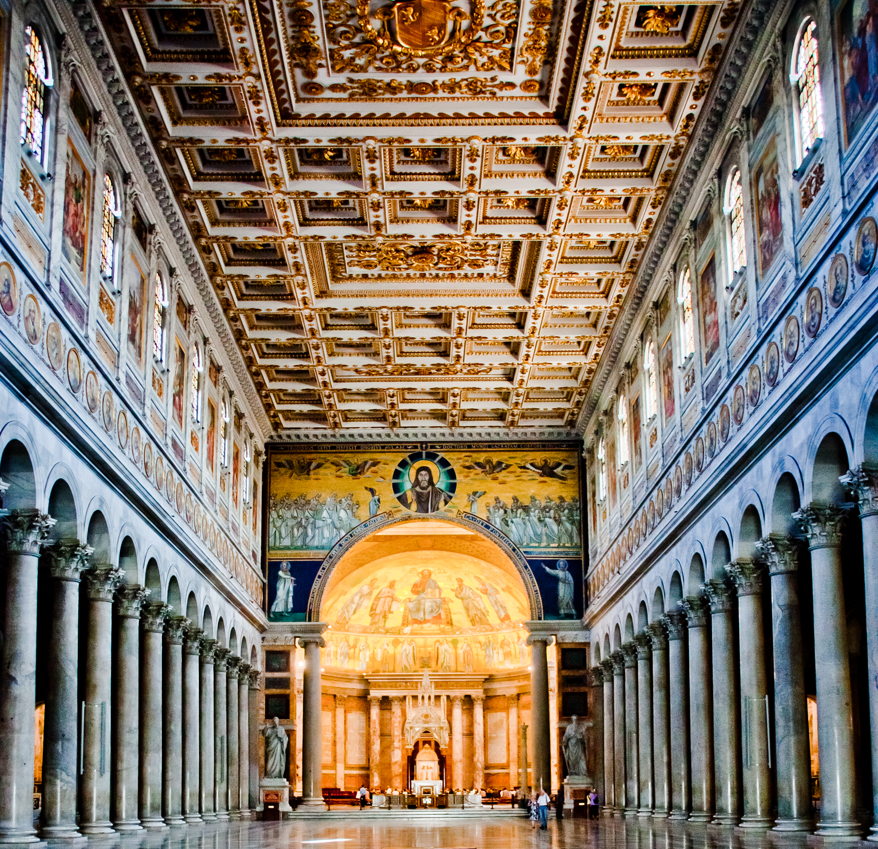 "Pequeña" basílica de San Pablo Extramuros considerada una de las cinco más antiguas de Roma.